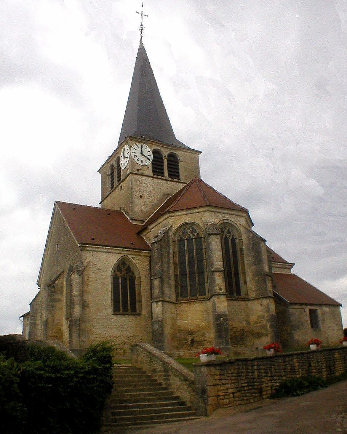 Brion-sur-Ource (Côte-d'Or) - l'église Prise de vue personnelle Siren 22 août 2005 à 11:04 (CEST)